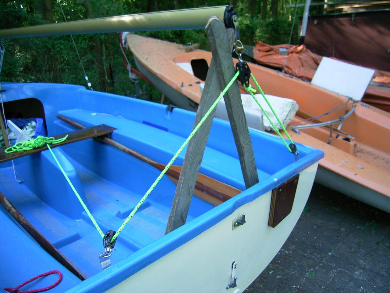 Großschot einer Jolle des Typs Piaf